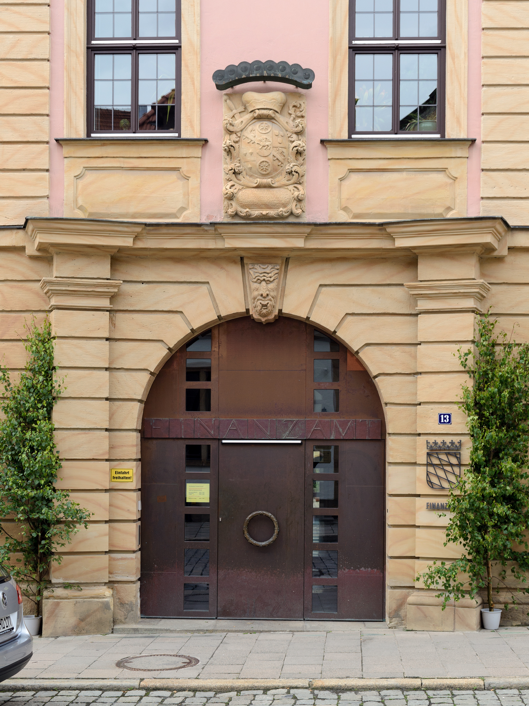 Eingangsportal des Gebäudes Amtsgerichtsstraße 13 in Kronach, ehemals fürstbischöfliches Kastenamt, heute Finanzamt. Über dem Portal ein Wappenstein mit dem Amtswappen des Bamberger Fürstbischofs Lothar Franz von Schönborn